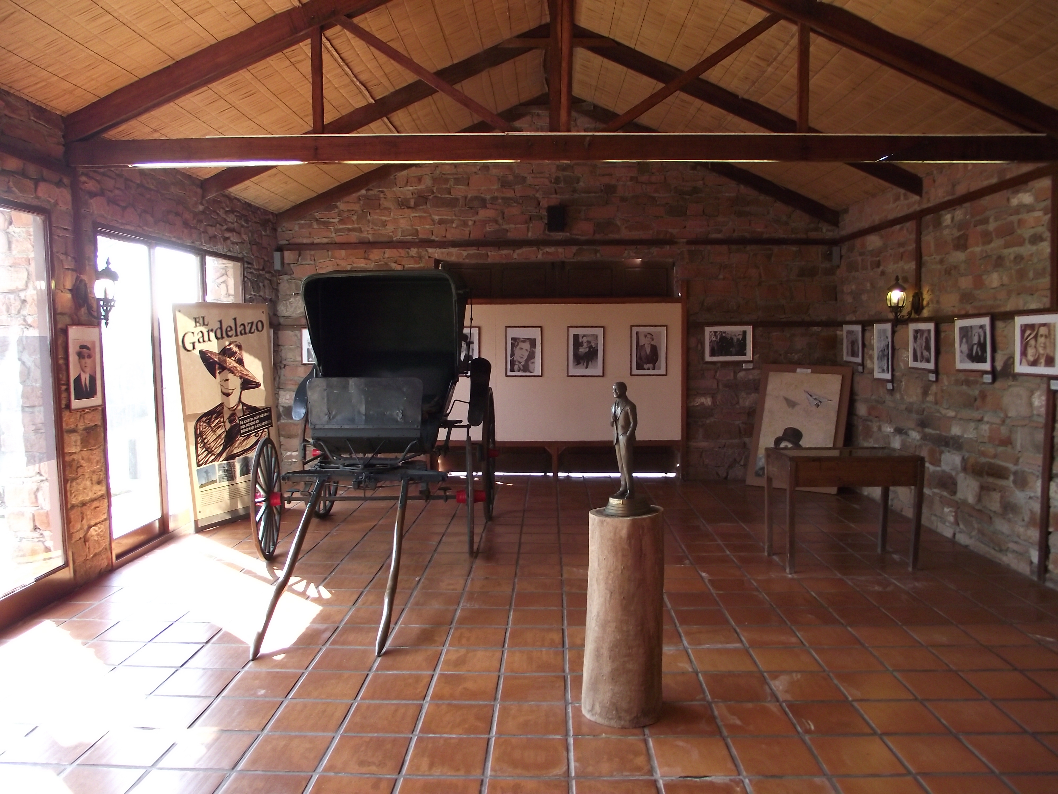 Museo Carlos Gardel, en Valle Edén (Tacuarembó, Uruguay)